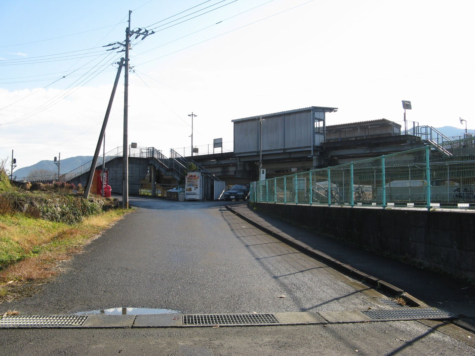 土佐くろしお鉄道有岡駅 南東望